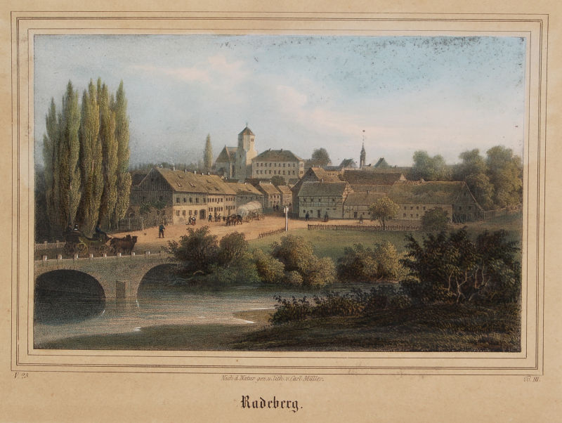 Radeberg